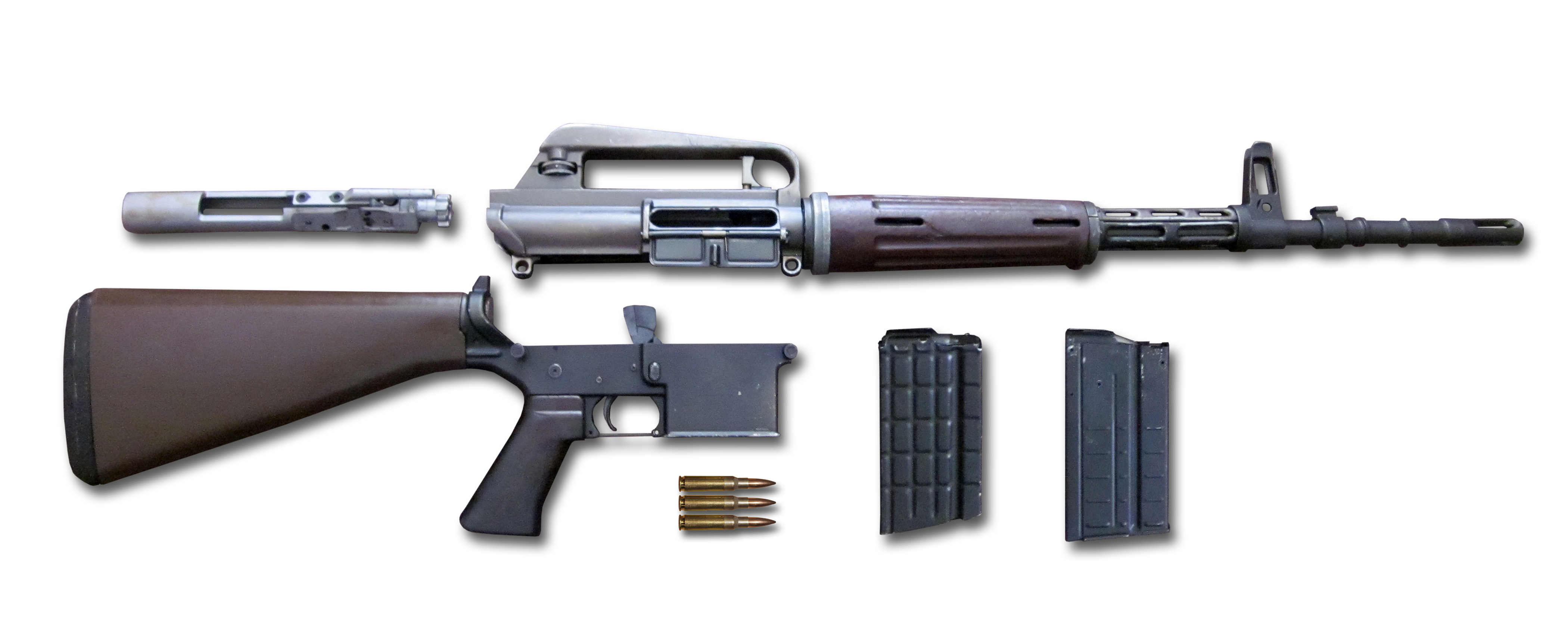 AR10 Armalite Fieldstrip